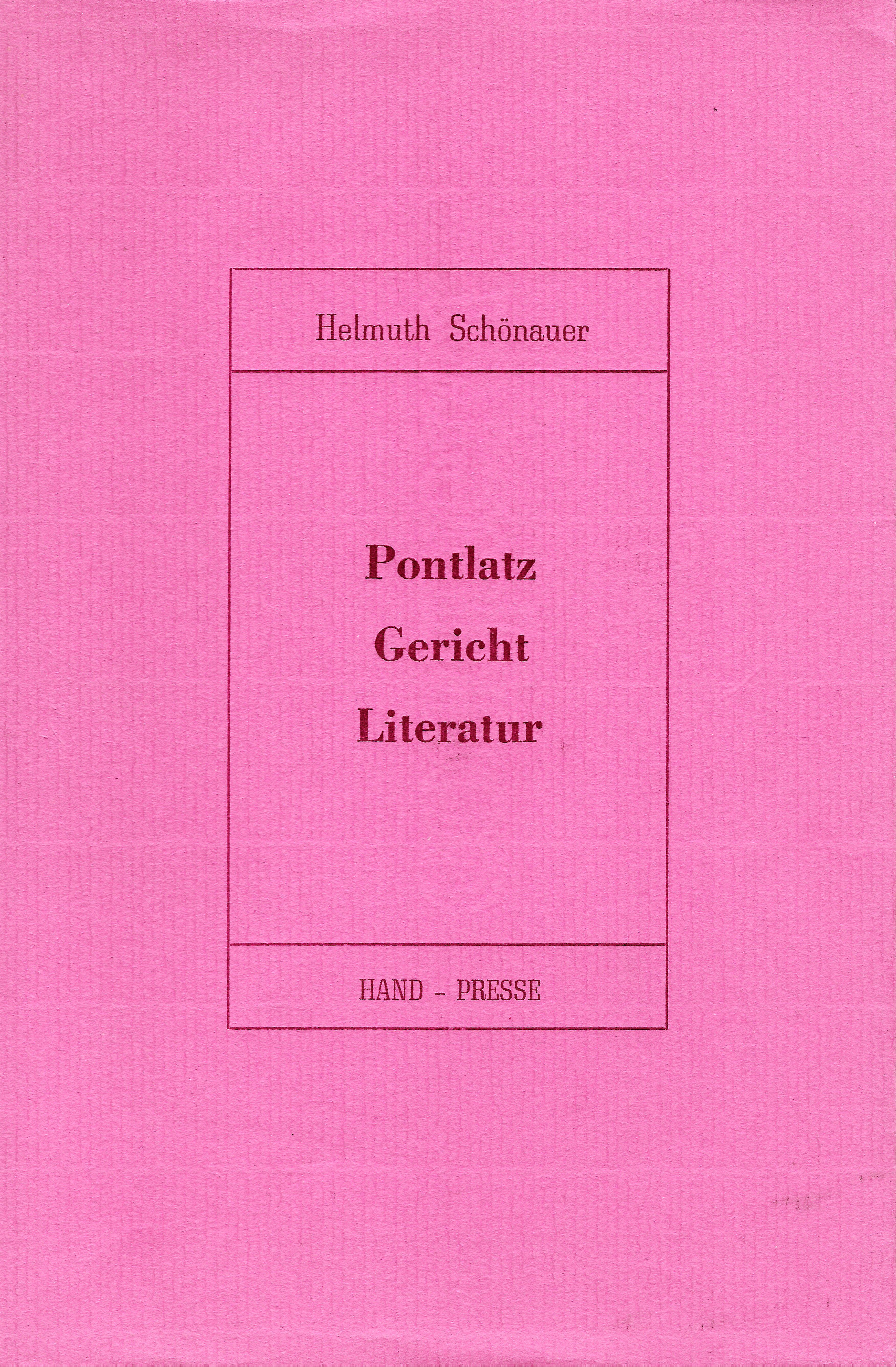 Cover des Buches: Helmuth Schönauer: Pontlatz. Gericht. Literatur. Hand-Presse, Innsbruck 1988. ISBN 3-900862-07-9.